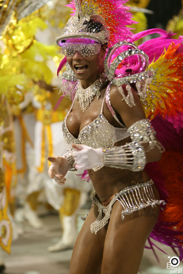 Adriana Bombom no Carnaval de 2010 em São Paulo.